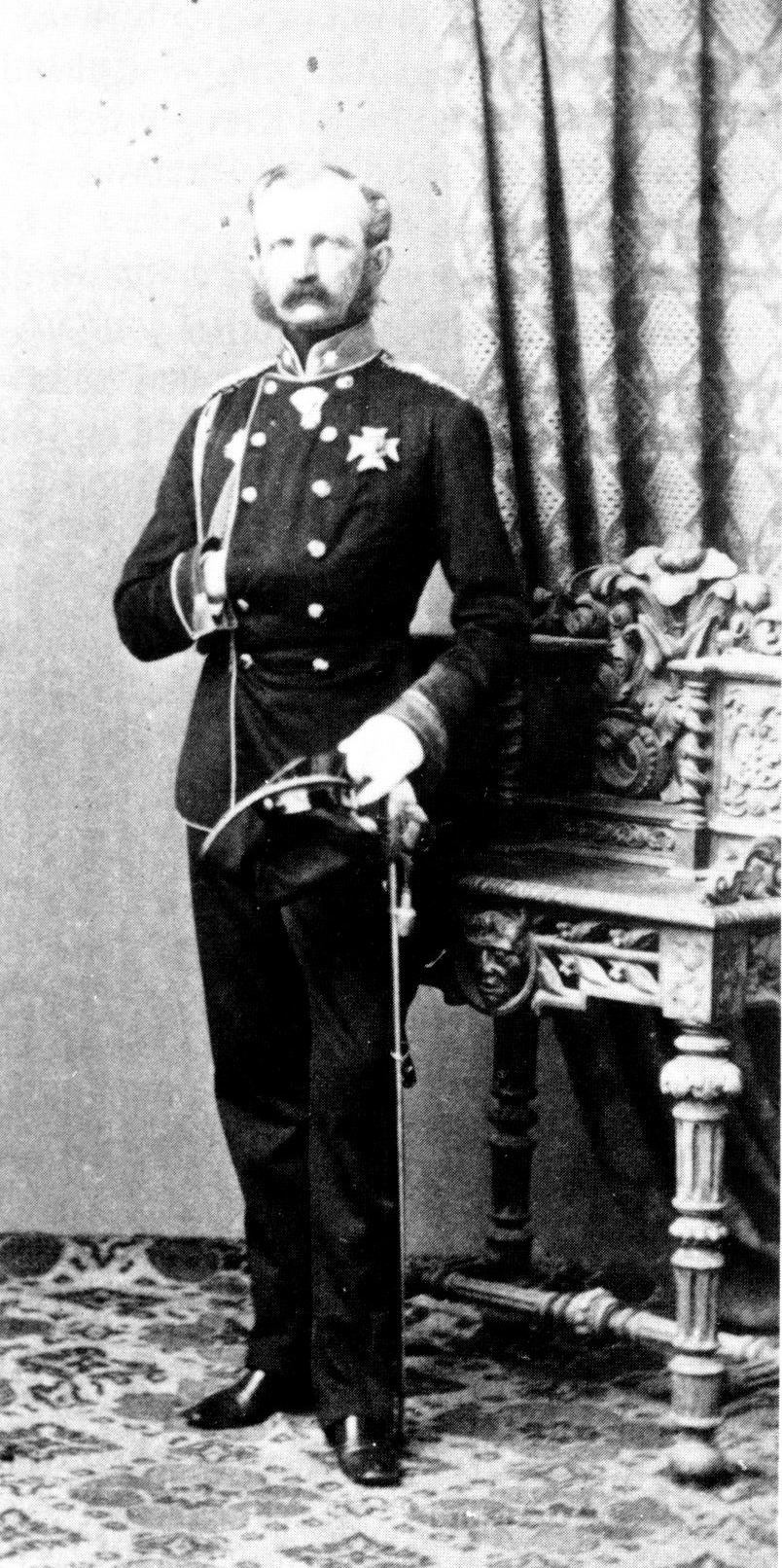 Hieronymus Anton von Ziemiecki von Ziemiecin (* 7. September 1817 in Kalisch, Kongresspolen; † 26. Februar 1906 in Krakau[1]) war ein deutscher bzw. österreichischer Offizier.